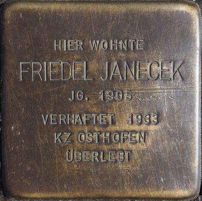 Stolperstein Janacek Friedel